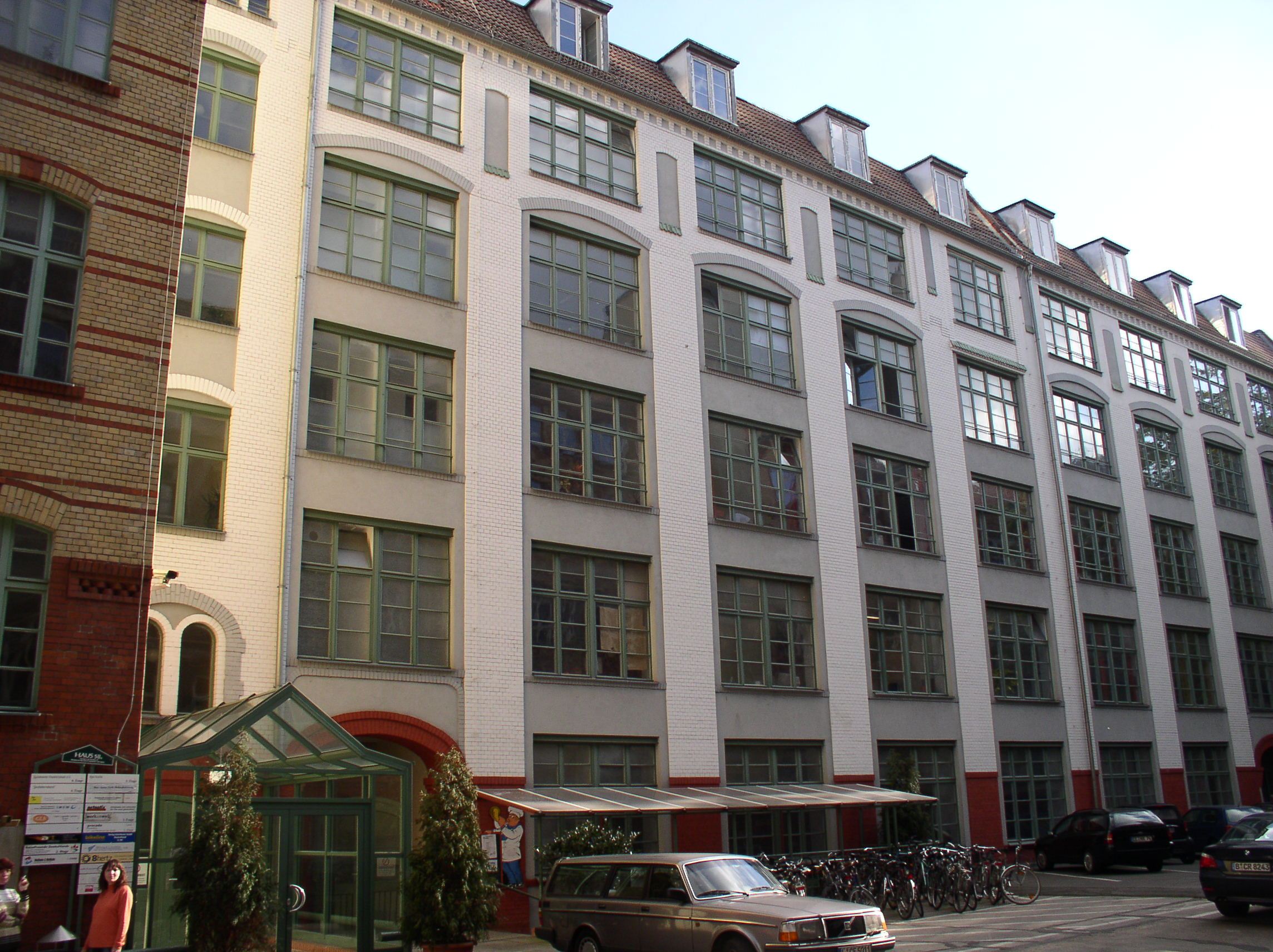 Ehemalige Werkshalle des Propellerwerkes in der Warschauer Straße in Berlin